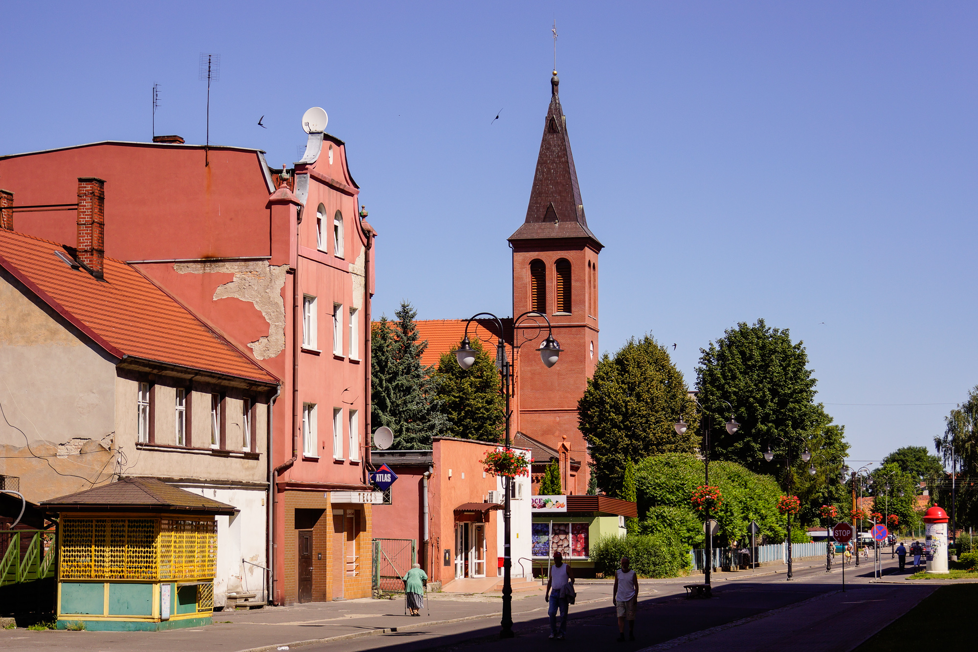 Pieńsk, kościół par. p.w. św. Franciszka z Asyżu, 1822-85, nr rej.: 5/A/00 z 10.03.2000.